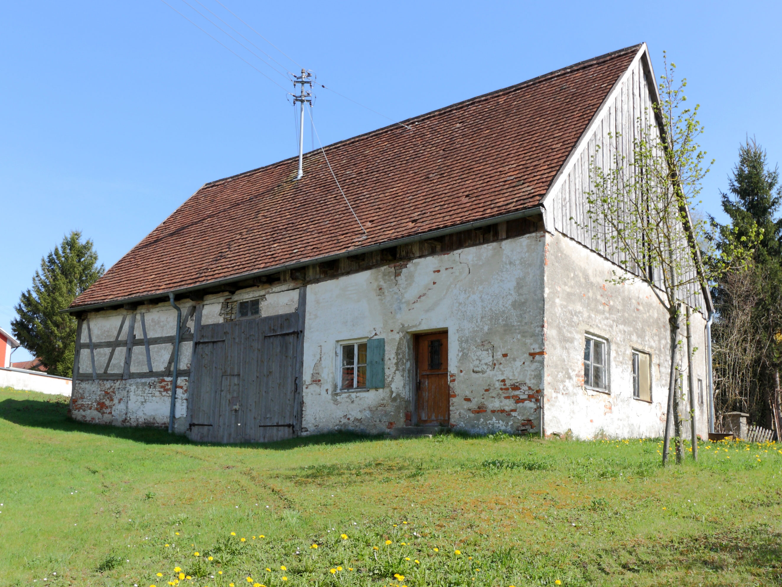 Pfarrhaus Memmenhausen; dazugehörender Pfarrstadel